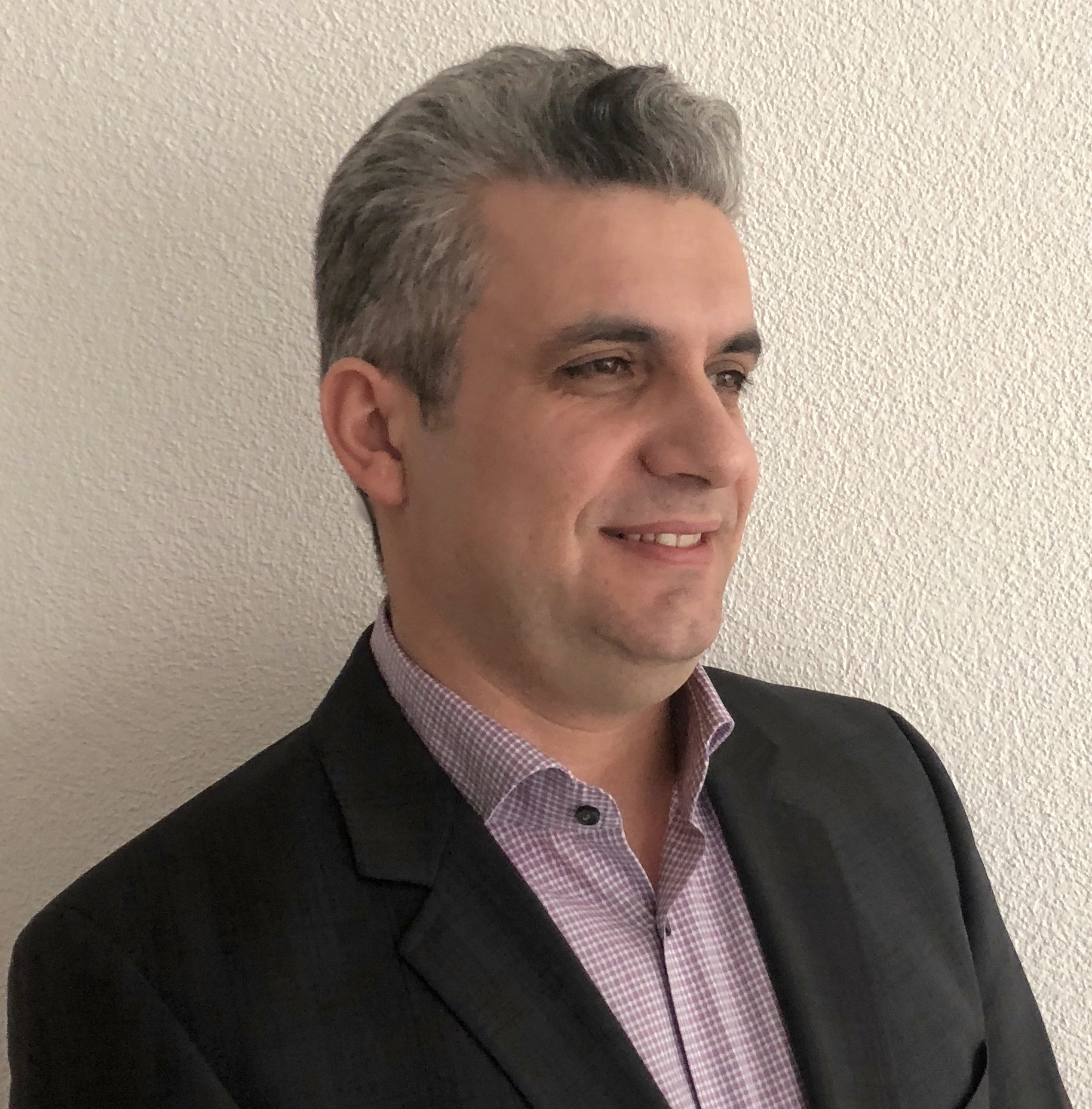 Profili